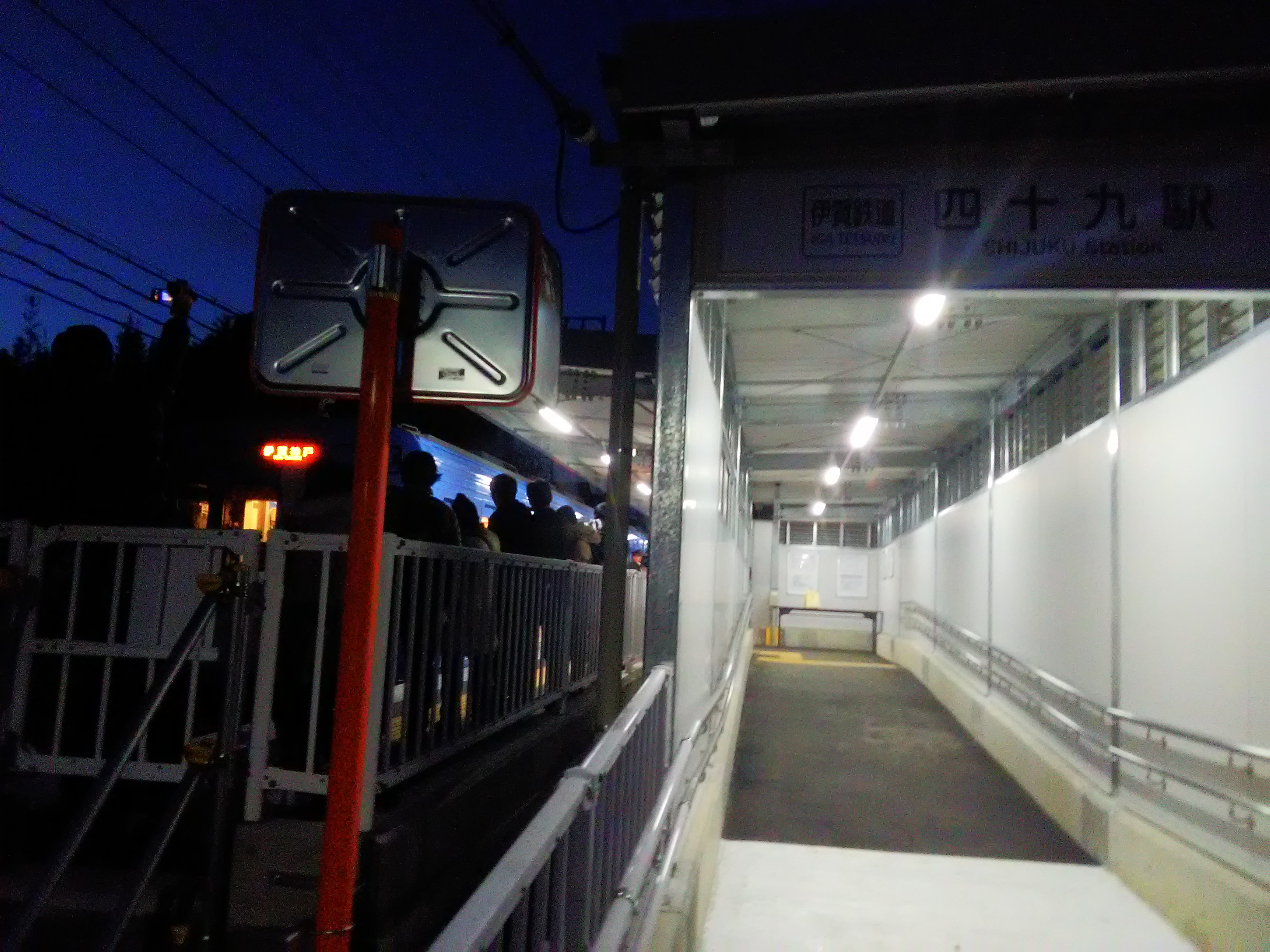 四十九駅。列車は開業日（2018年3月17日）の一番列車（伊賀神戸行き）。